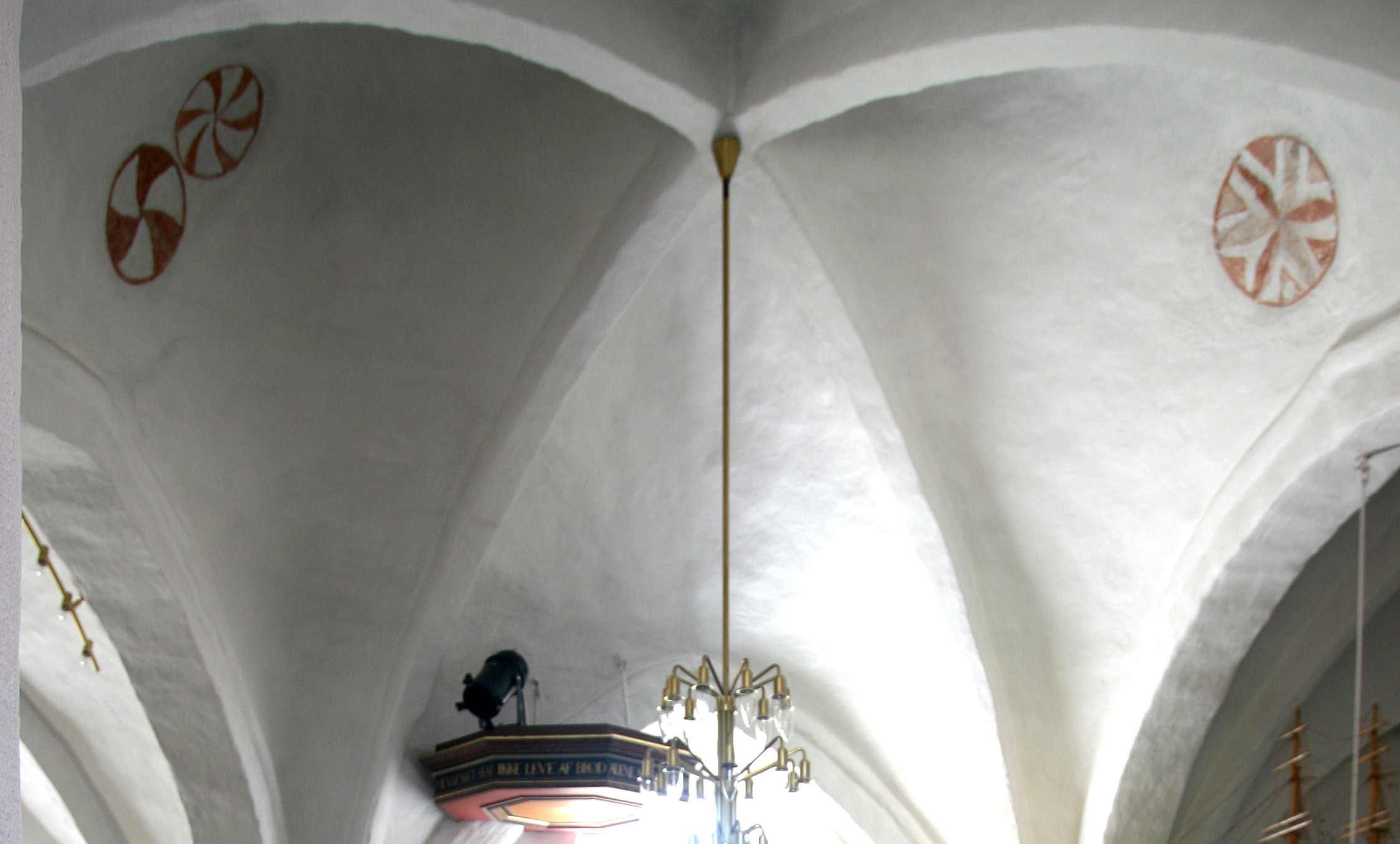 Ølsemagle Kirke, near Køge, Denmark. Circular frescoe decorations.